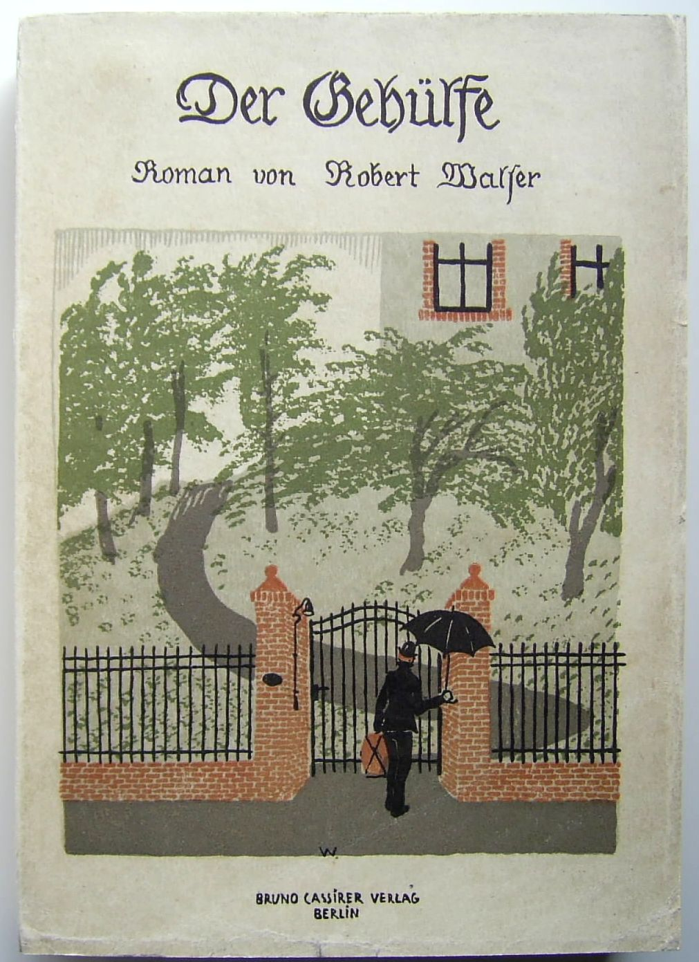 Robert Walser - Der Gehülfe, Erstausgabe 1909 in Verlagsbroschur